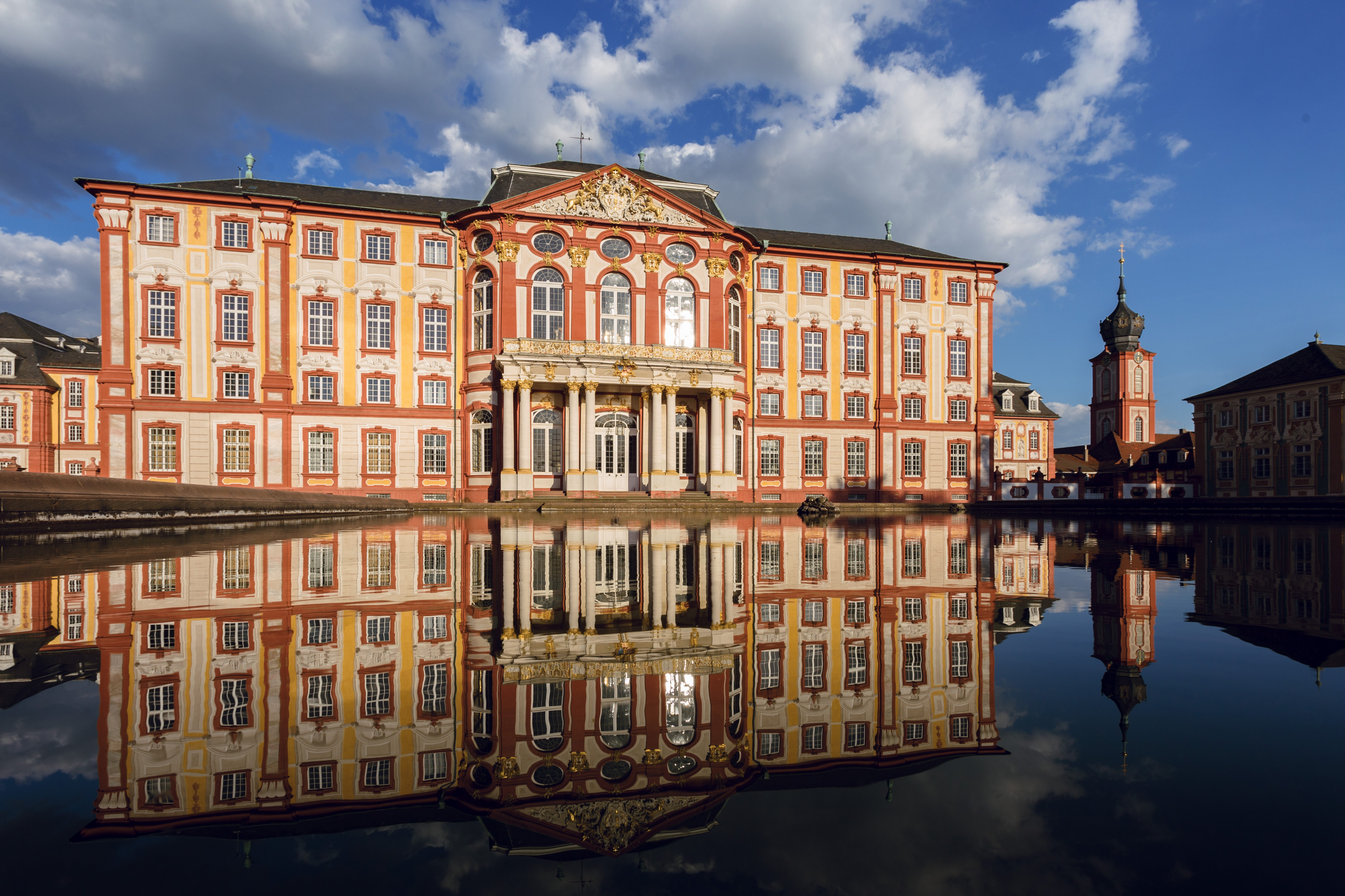 Schloss Bruchsal von der Gartenansicht mit dem Kirchturm der Hofkirche